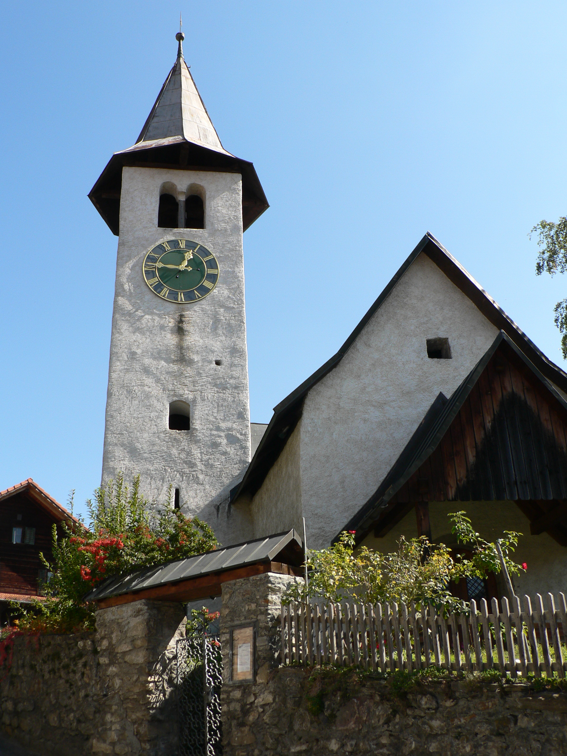 ref. Kirche in Maladers, Graubünden, Schweiz